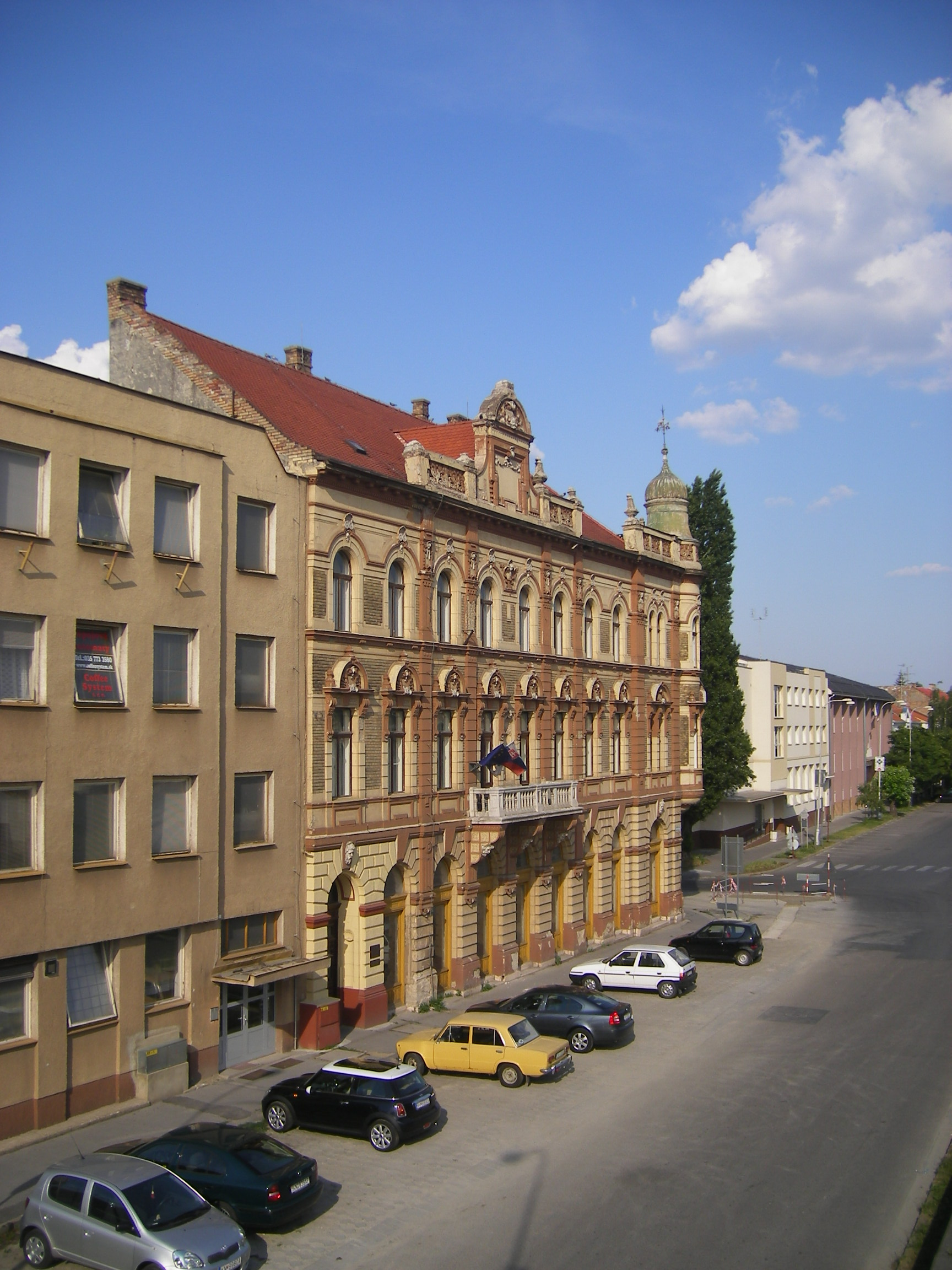 Komárom - az egykori Grand kávéház épülete és a Duna rakpart a Kis-Duna hídjáról fényképezve